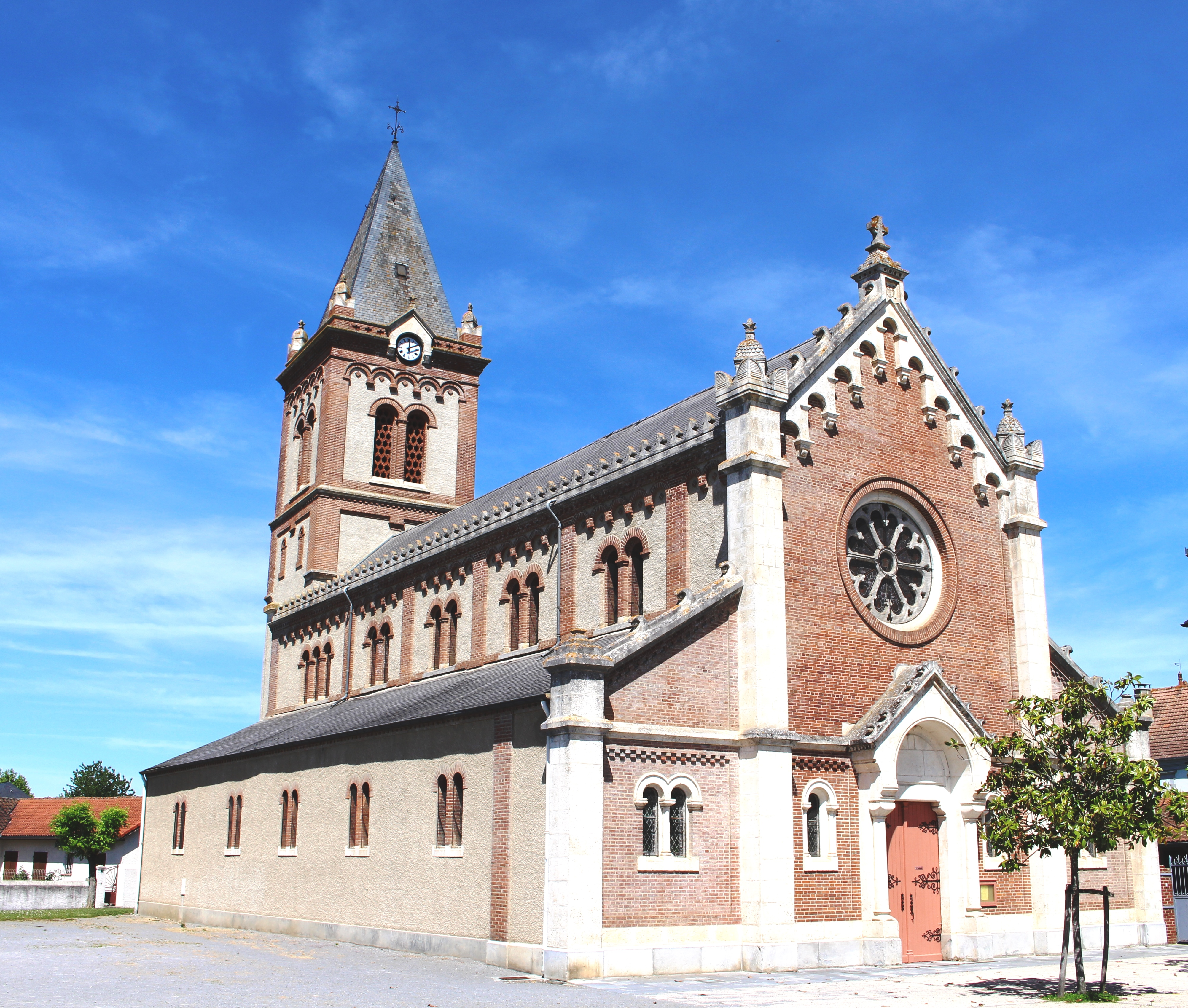 Église Saint-Nicolas de Pujo (Hautes-Pyrénées)